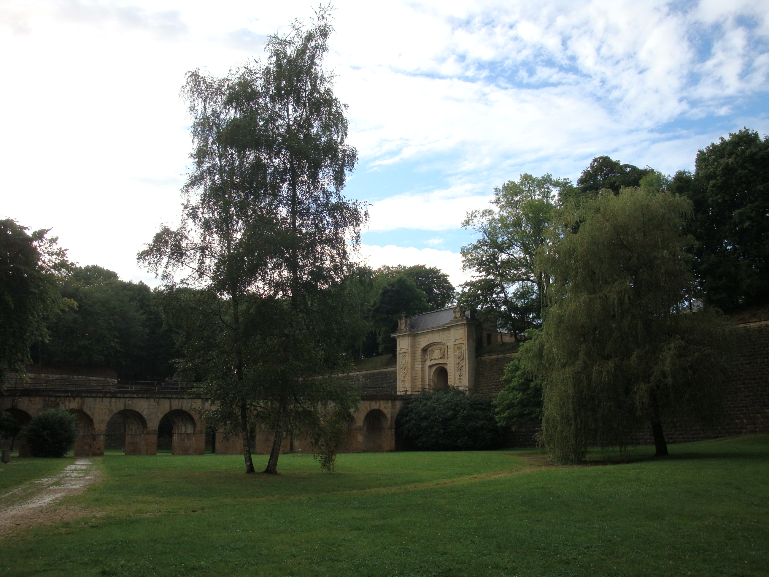 Vue générale des remparts Vauban à Longwy (54). Porte de France.